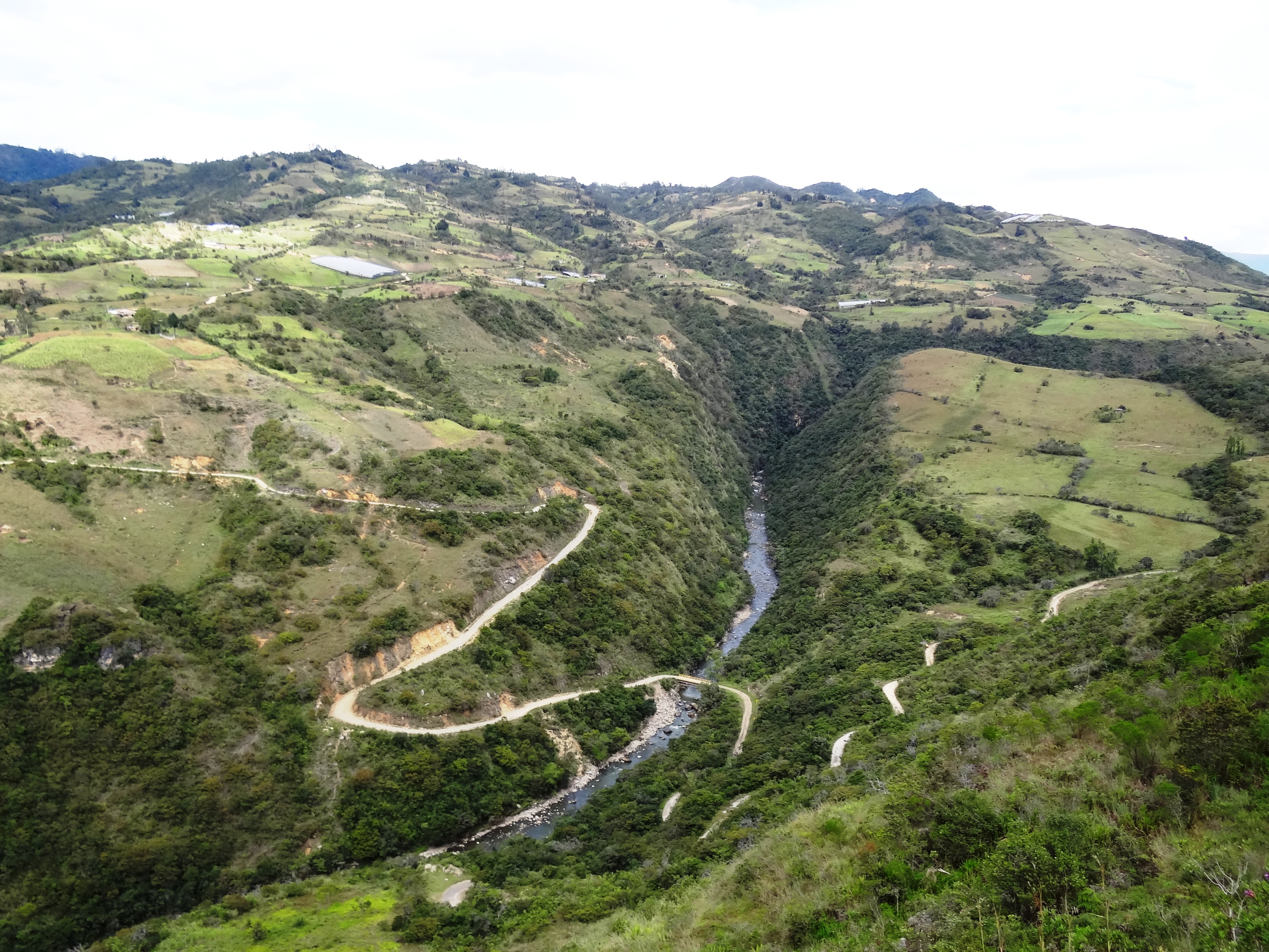 Paraje rural desde el Paso del Ángel sobre el río Moniquirá, en límites entre los municipios de Gachantivá (izquierda) y Santa Sofía (derecha), departamento de Boyacá, Colombia